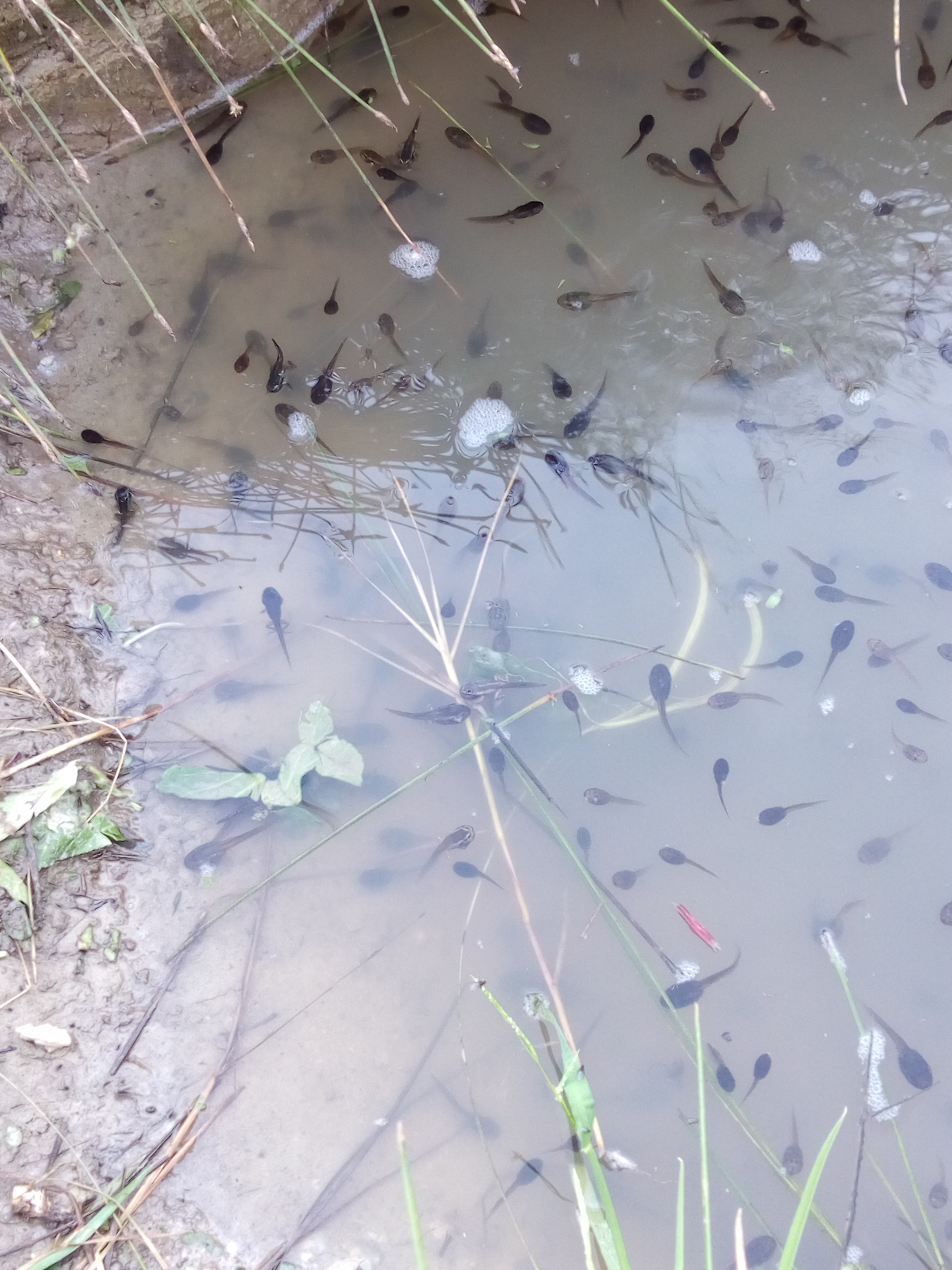 Renacuajos en la salacuna del Humedal Madre de Agua de la rana sabanera (Dendropsophus molitor)